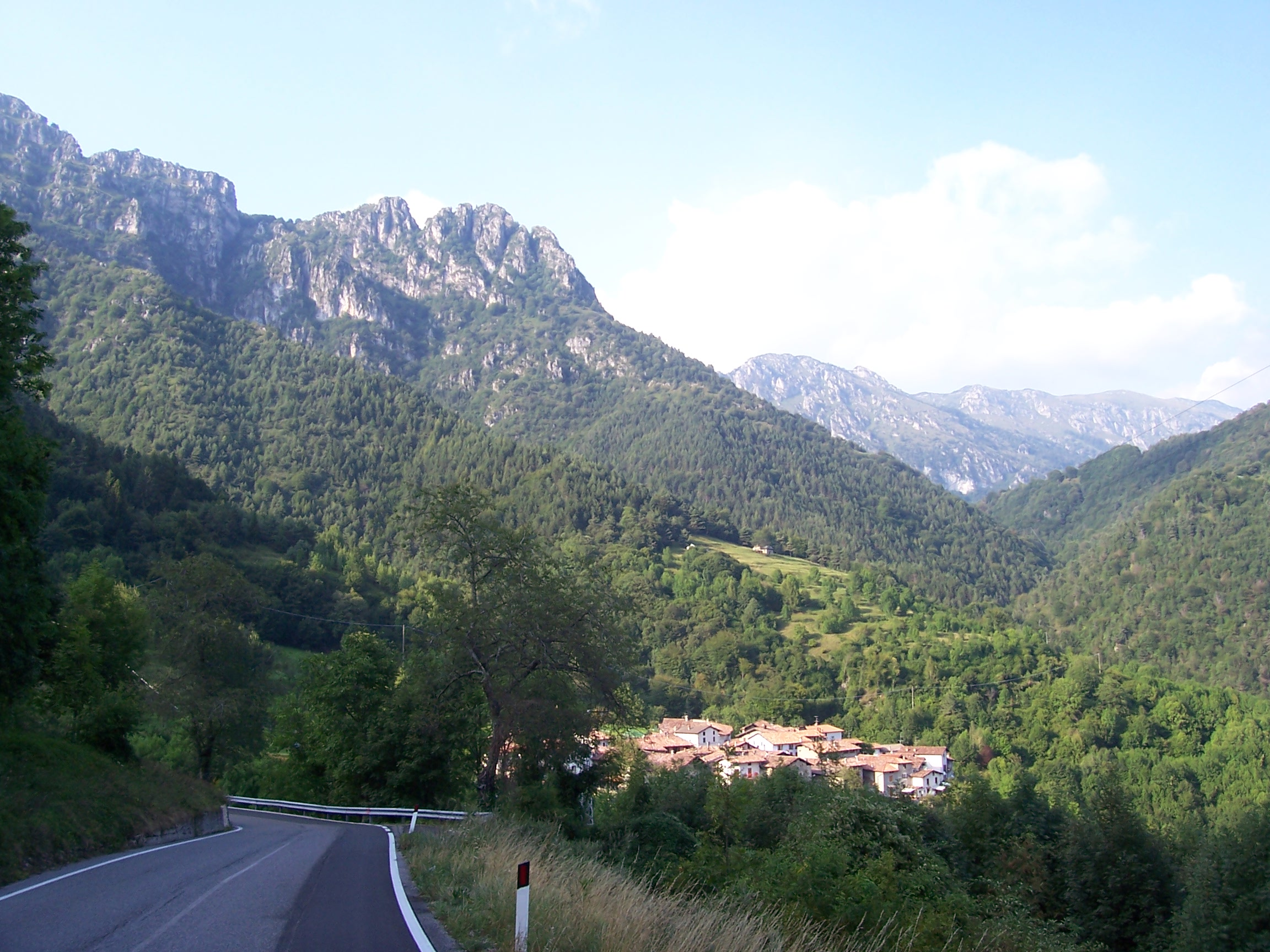 il monte Cingla in provincia di Brescia